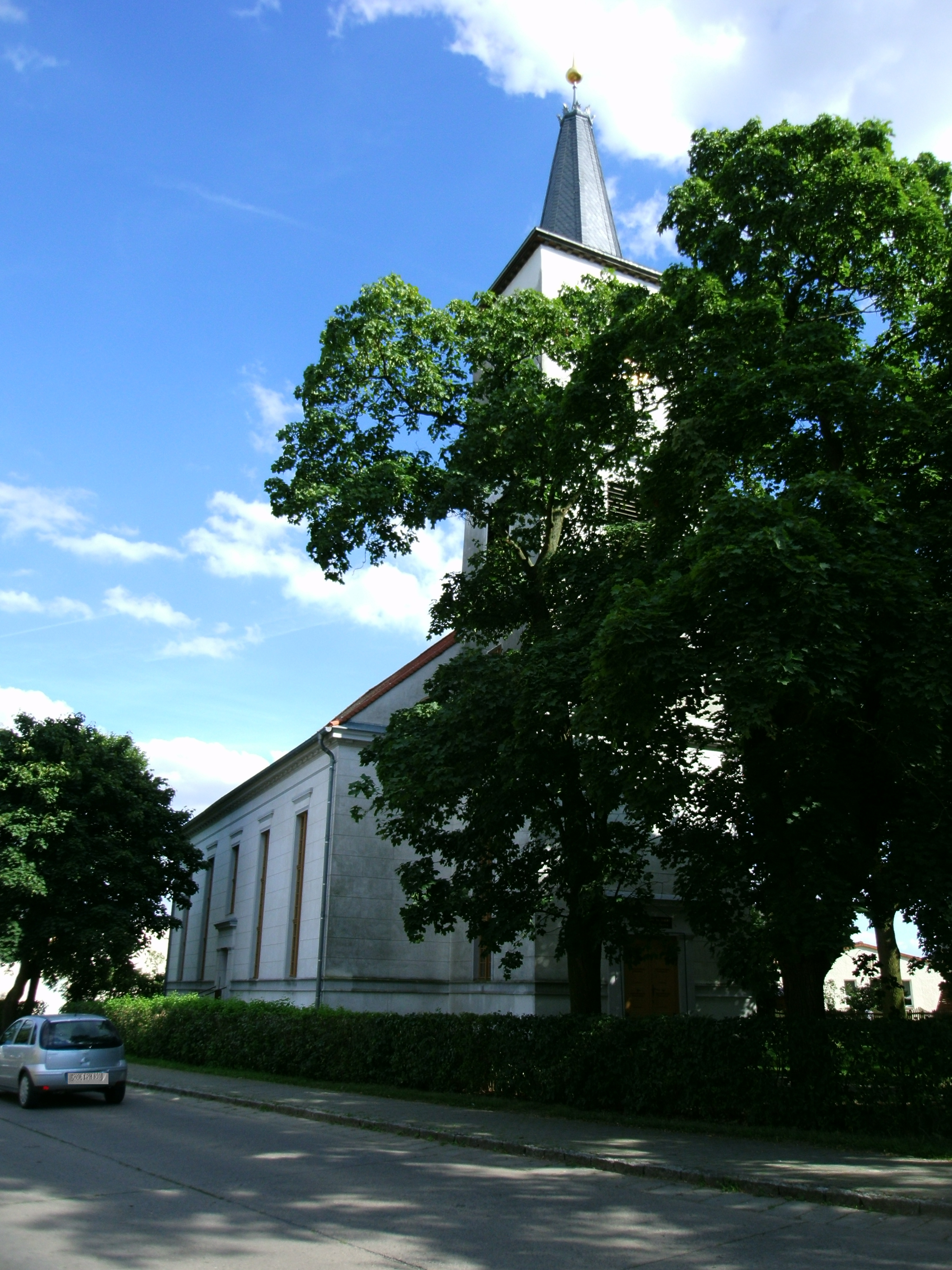 Dorfkirche Altreetz, Gemeinde Oderaue, Brandenburg, Germany